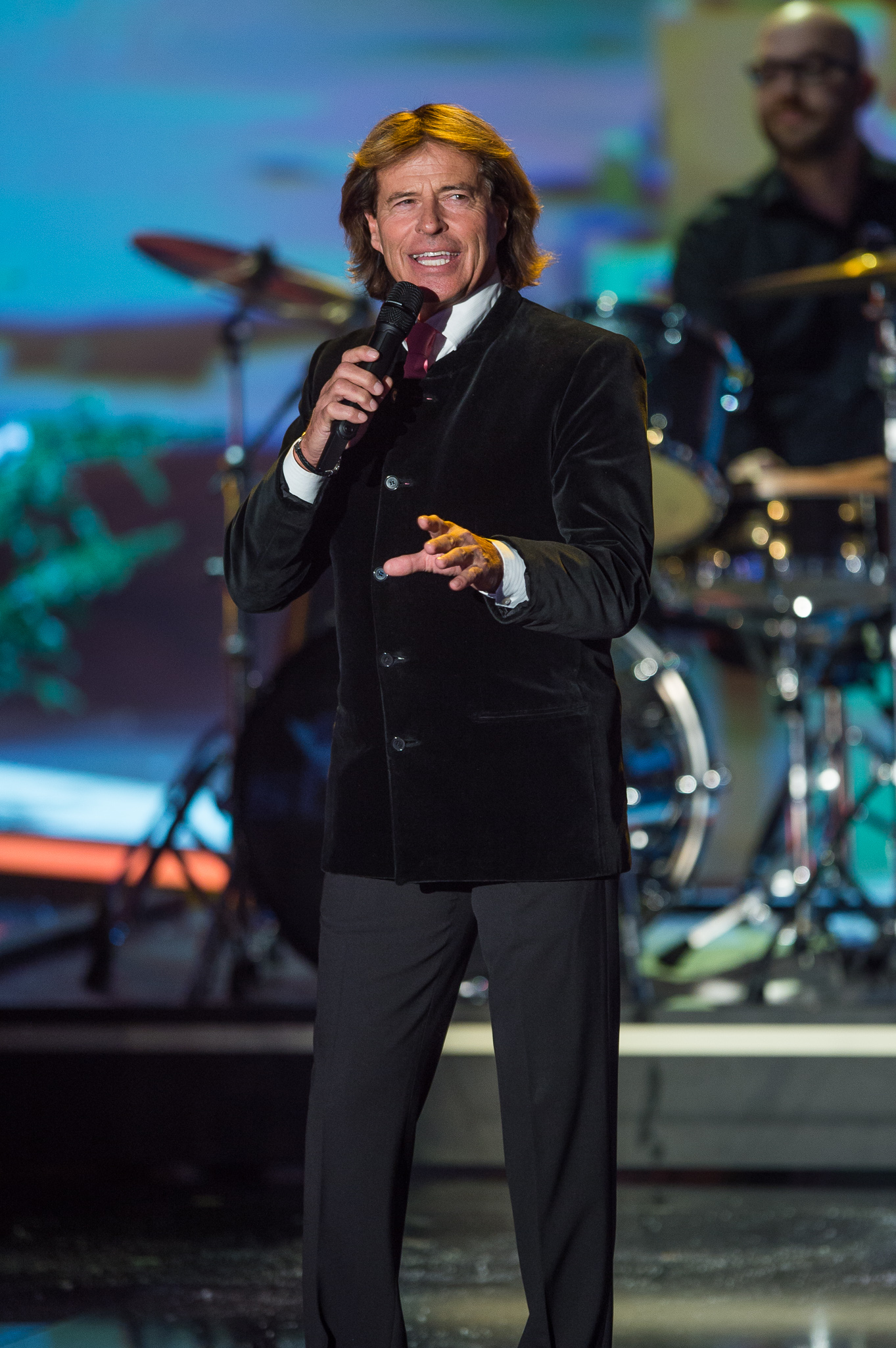 BR,Bayerisches Fernsehen,Frankenhalle,Hansi Hinterseer,Johann Ernst Hinterseer,Live-Sendung,Sternstunden-Gala,Sternstundengala